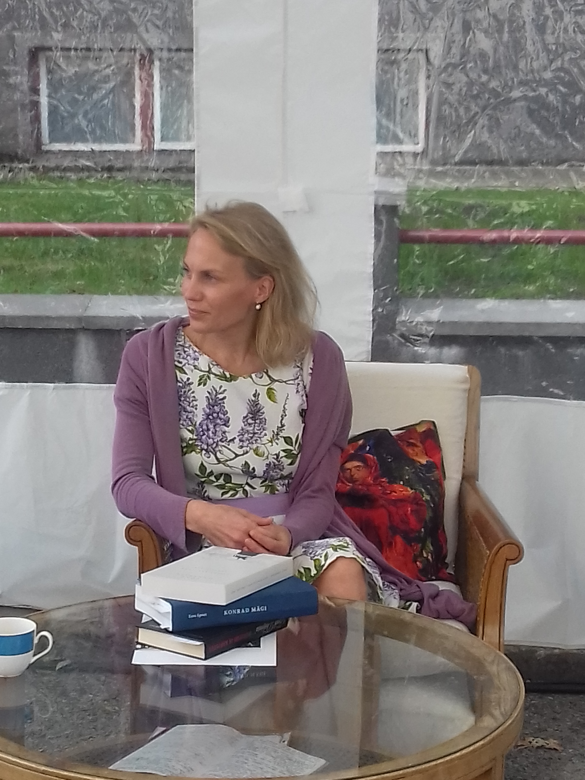 Külli Teetamm esinemas kirjandustänaval